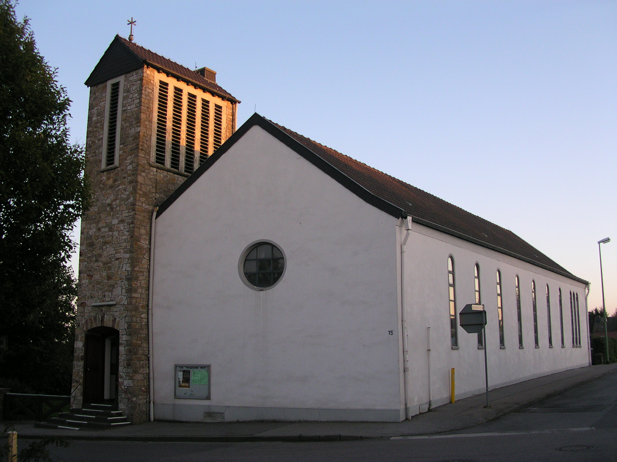 Stolberg Werth, rk. Josefskirche